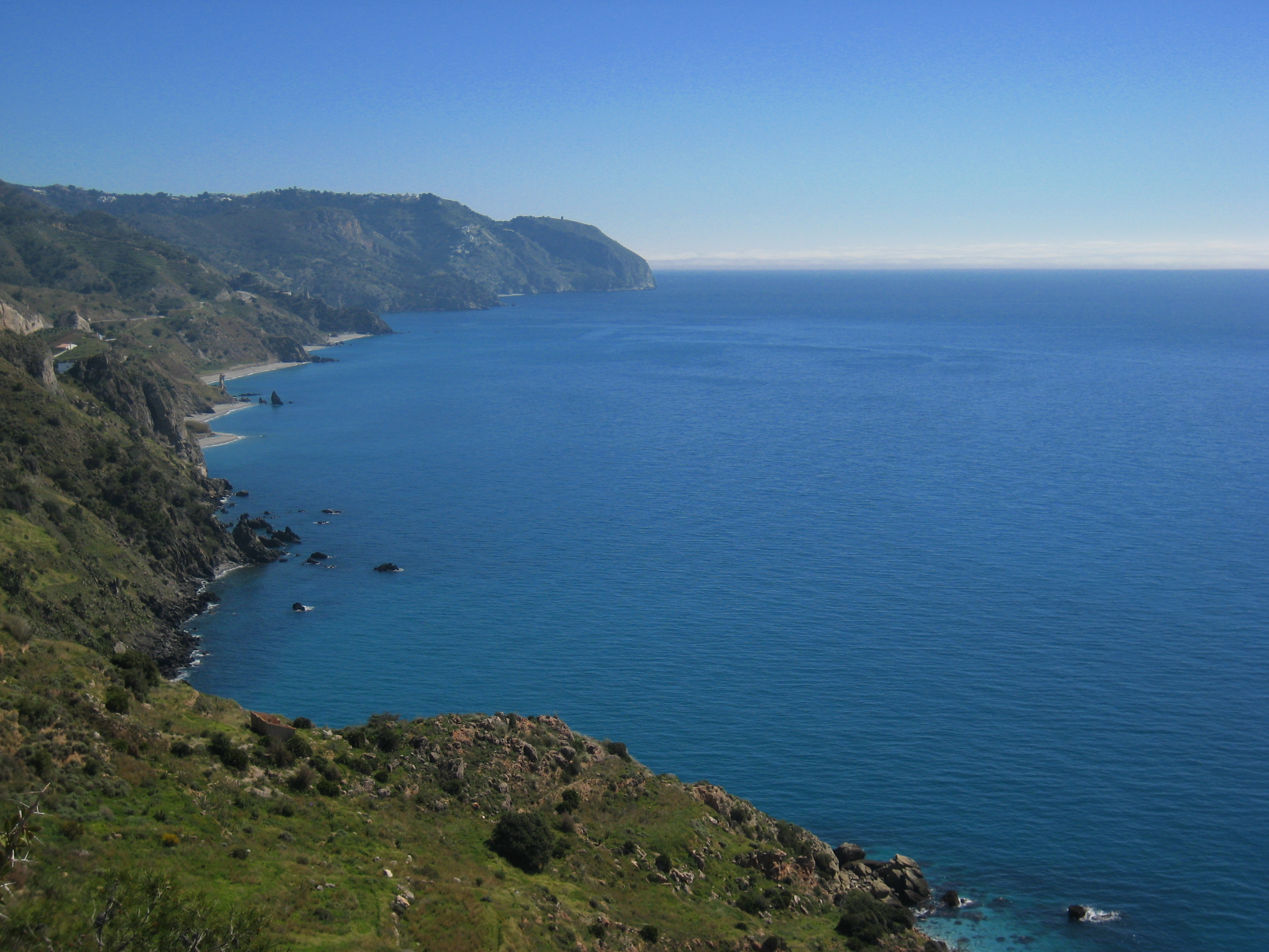 Acantilados de Maro, Nerja, Málaga, España